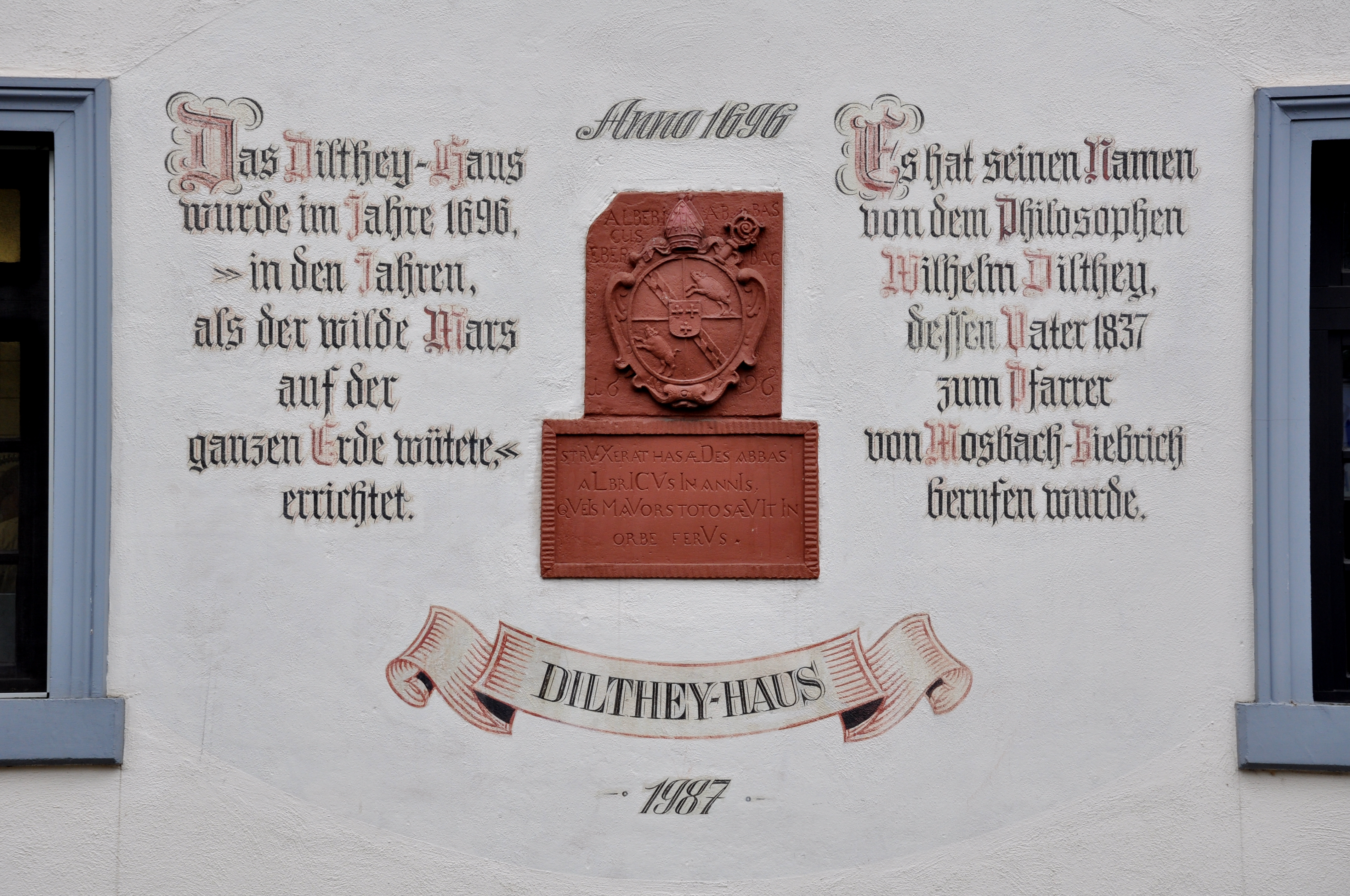 Wiesbaden-Biebrich, Dilthey-Haus, Inschrift und Wappenrelief